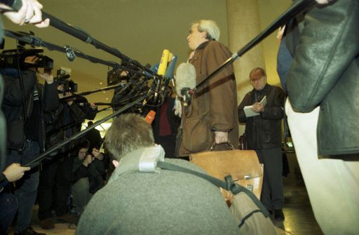 Medienberichterstattung anlässlich der dritten Vernehmung von Helmut Kohl vor dem Spenden-Untersuchungsausschuss am 25.01.2001 in Berlin